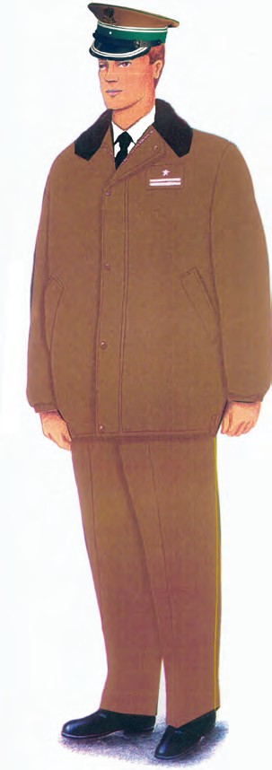 Ubiór wyjściowy funkcjonariuszy noszących umundurowanie WL z kurtką służbową SG i z czapką garnizonową.